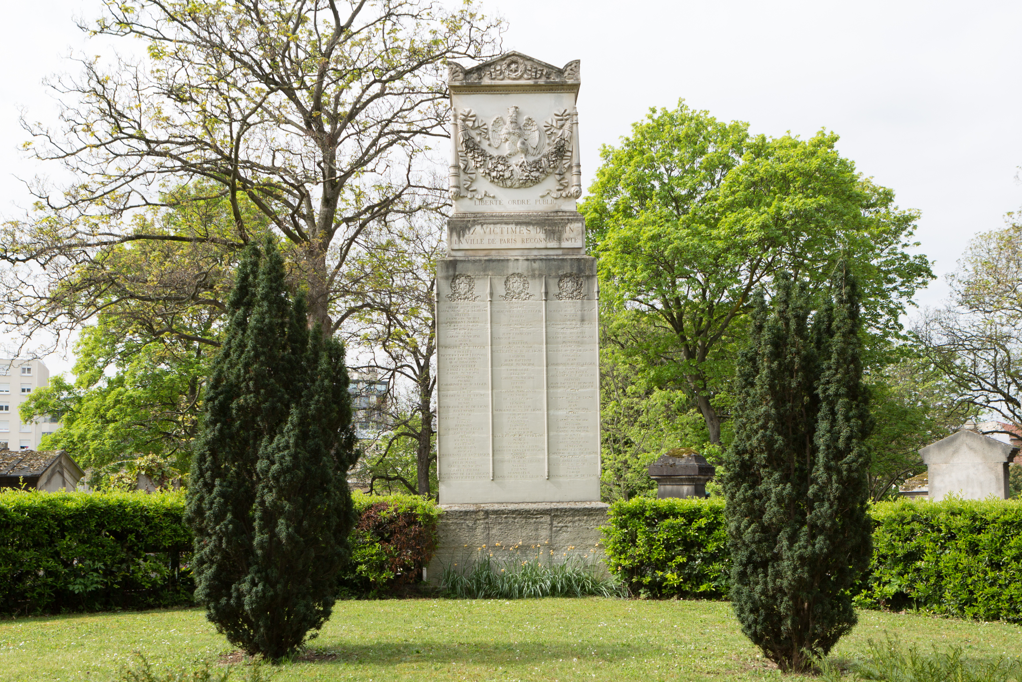 Stèle surmontée d'un cénotaphe située dans un emplacement d'une centaine de mètre entourée d'un balustrade. Monument élevé par la ville de Paris qui l'entretient au titre de « sépulture historique ». Il a été érigé sous la Monarchie de Juillet (1830-1848), suite aux journées révolutionnaires des 5 et 6 juin 1832, en hommage à la Garde Nationale défendant le régime monarchique dont l'emblème est le coq gaulois et la devise est « Liberté, ordre public ».